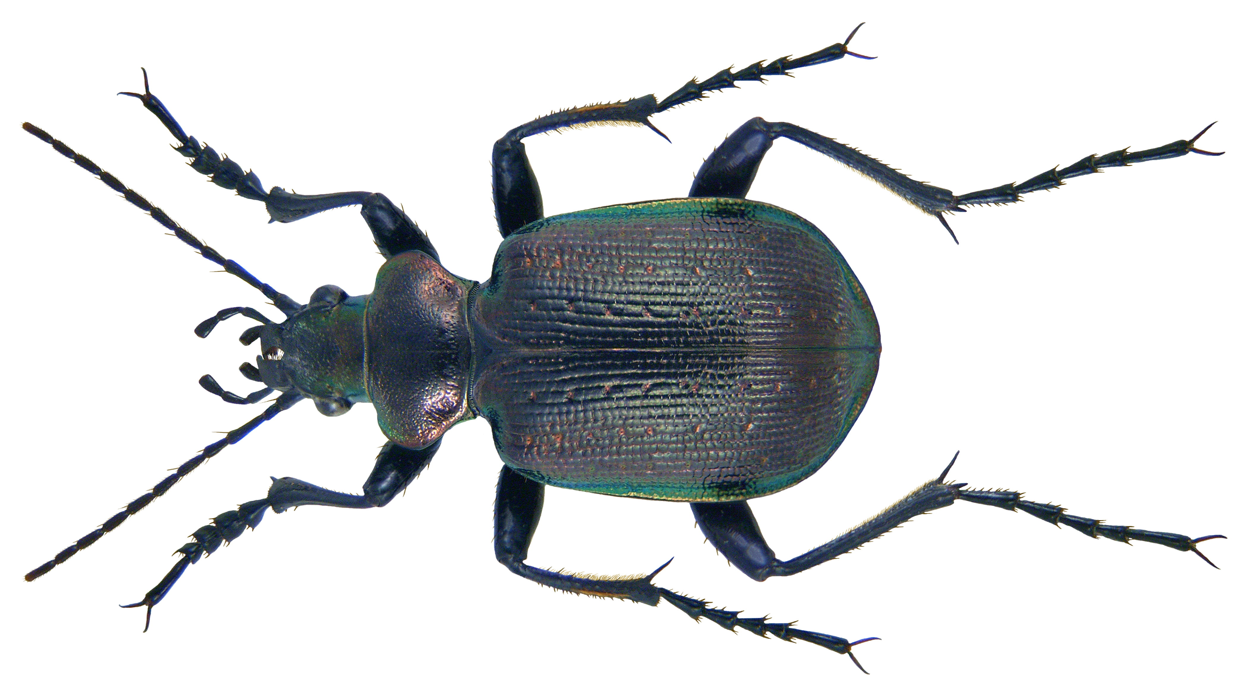 Familie: Carabidae Grösse: 13-24 mm Verbreitung: Palaearktis Ökologie: Kaefer und Larven ernähren sich von Raupen und Puppen auf Bäumen Fundort: England, Dendless Wood leg.det. M.G.Telfer, 2003 Foto: U.Schmidt, 2009